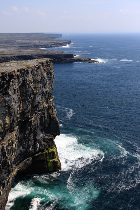 Falaise de l'Ile d'Aran, en Irlande.